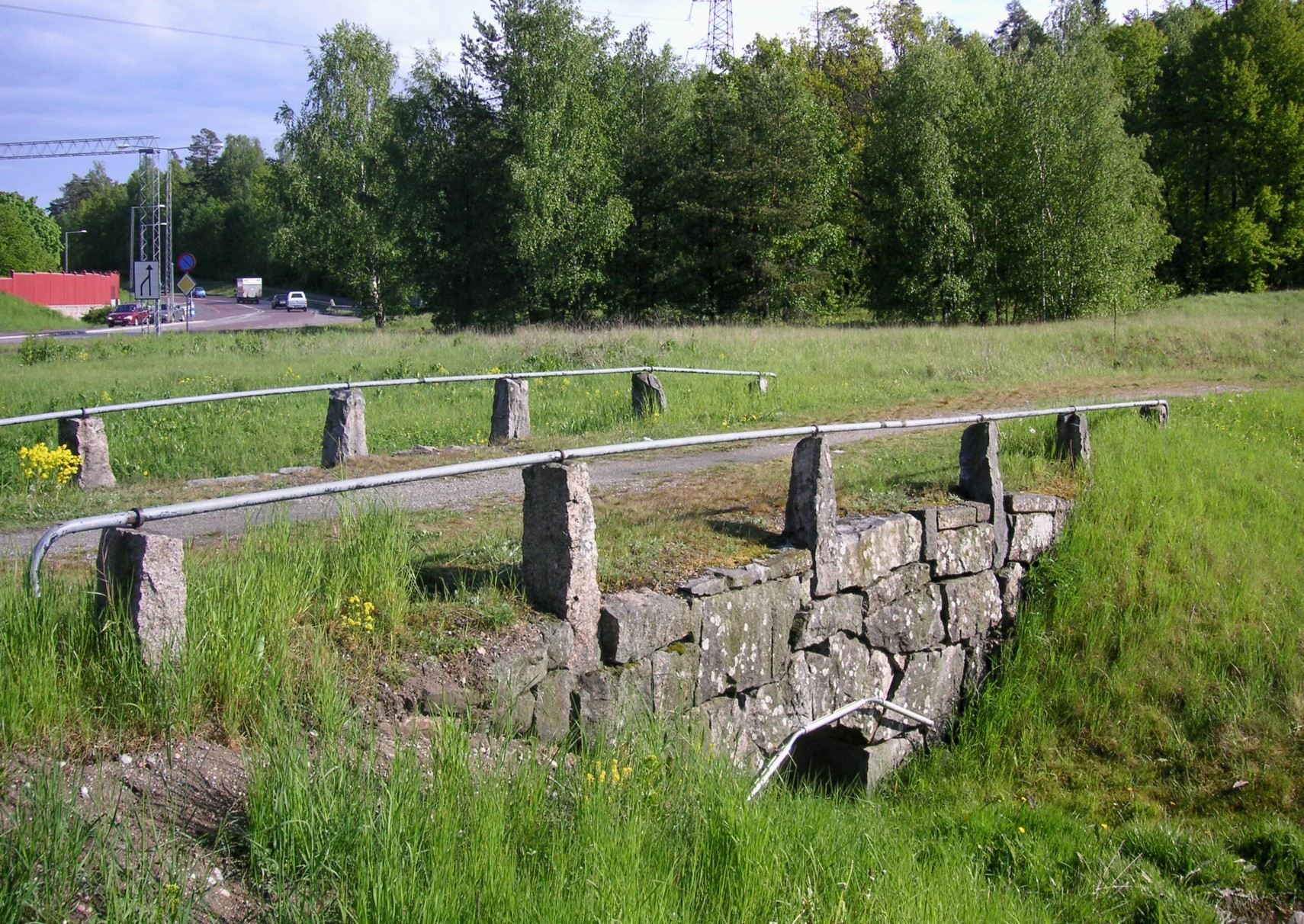 Göta landsväg i Alby, stenvalvsbron vid Eriksbergs industriområde, Hågelbyleden syns i bakgrunden.